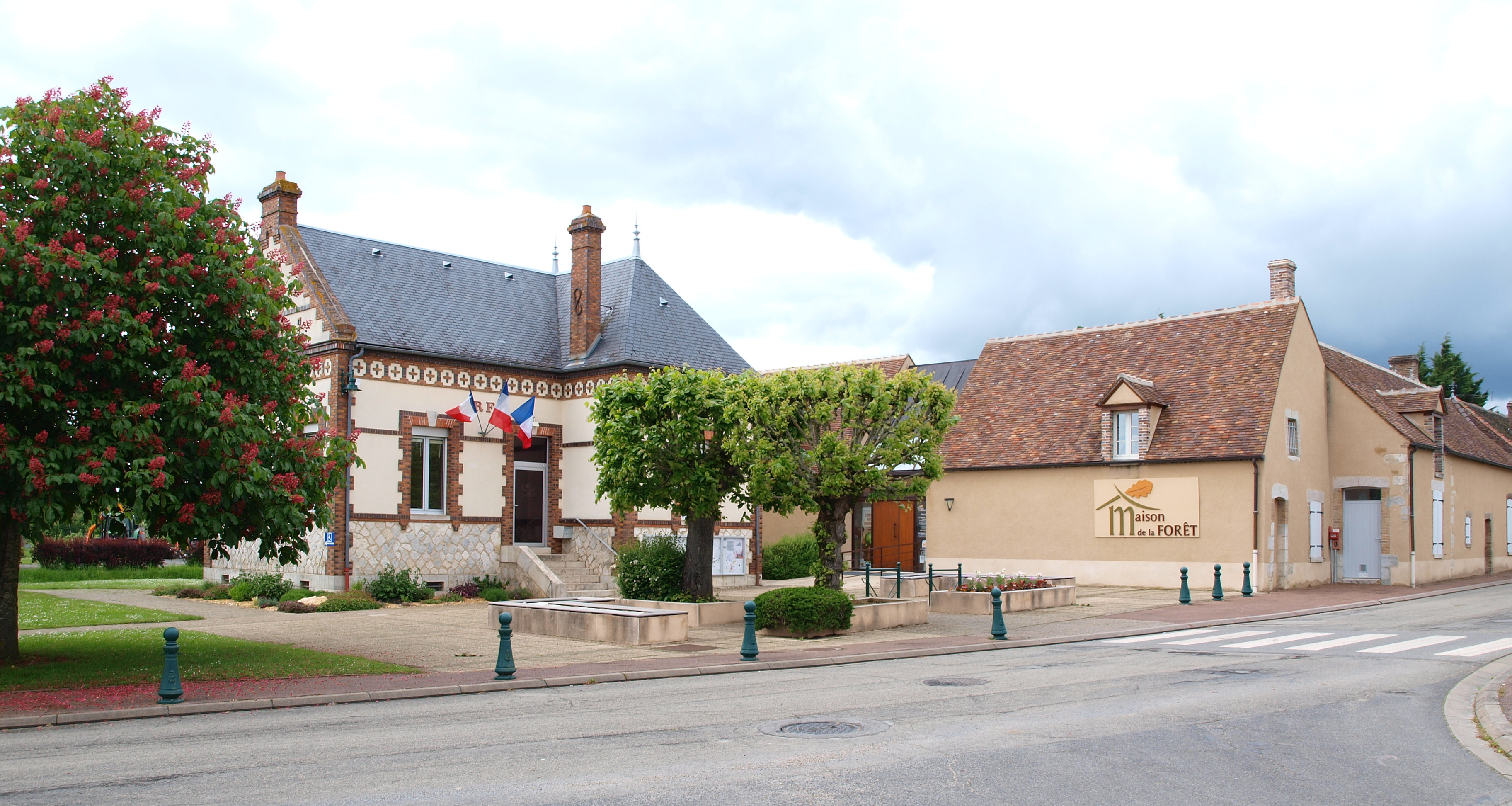 Paucourt (Loiret, France)